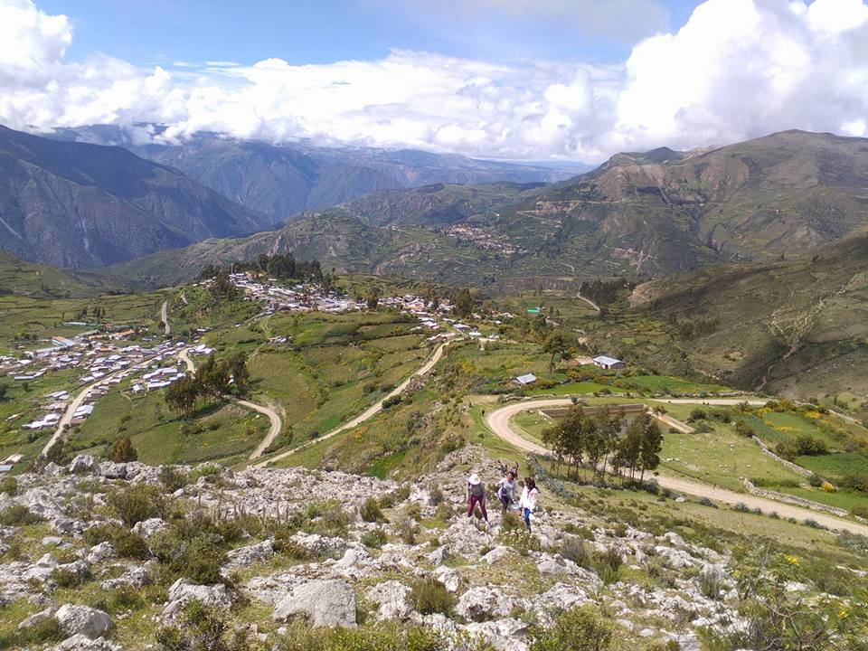 Vistas Panorámicas de Hualla